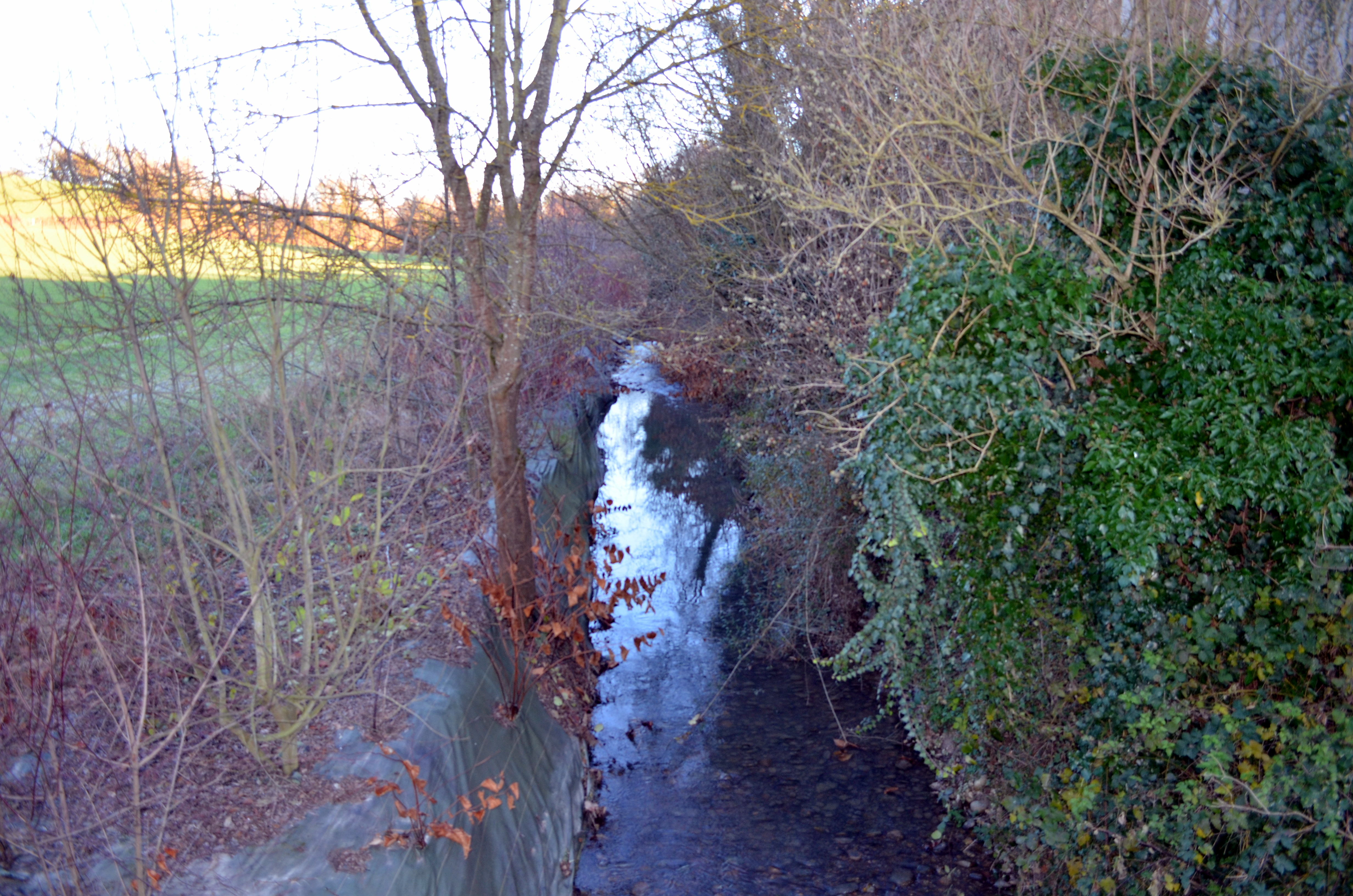 Le Morbier à Toussieux.